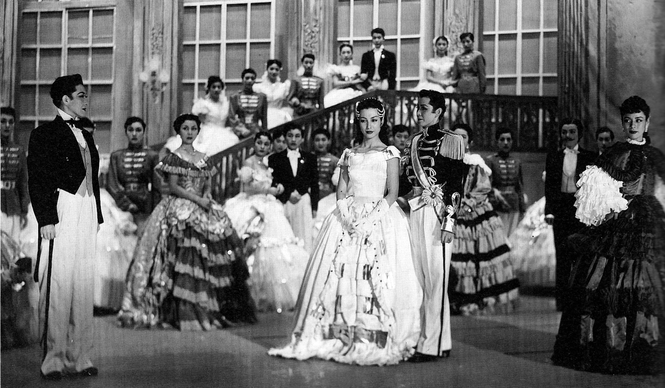 宝塚歌劇団による「君の名は ワルシャワの恋の物語」舞台写真。前列左から、春日野八千代（Kasugano Yachiyo）・新珠三千代（Aratama Michiyo）・神代錦（Kamiyo Nishiki）・故里明美（Furusato Akemi）